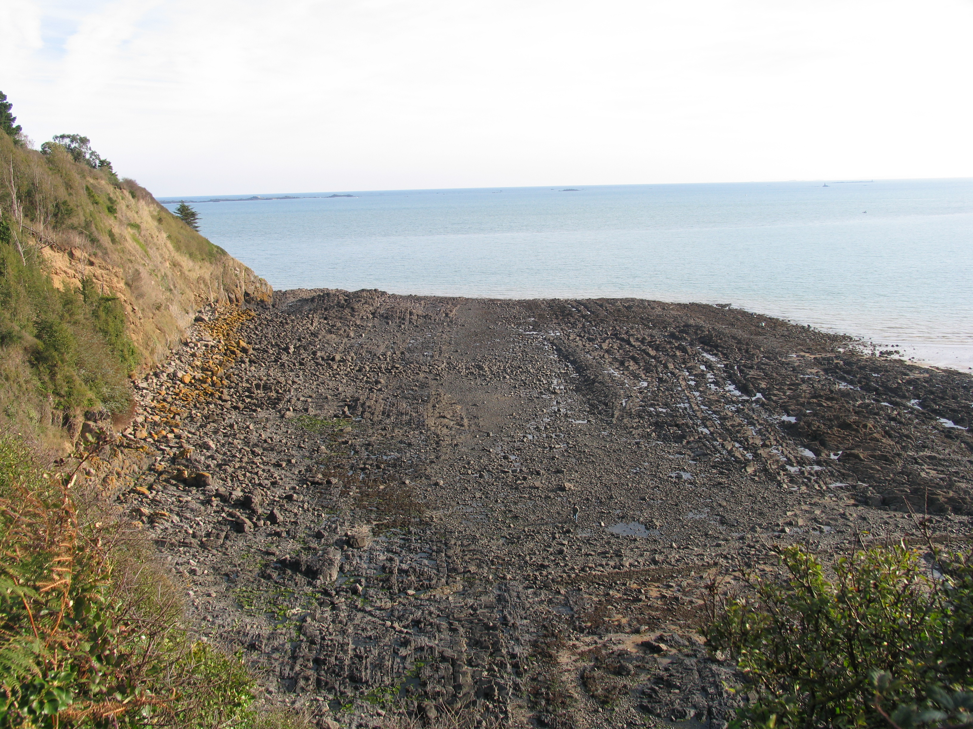 Plate-forme d'abrasion à marée basse, Goélo, France